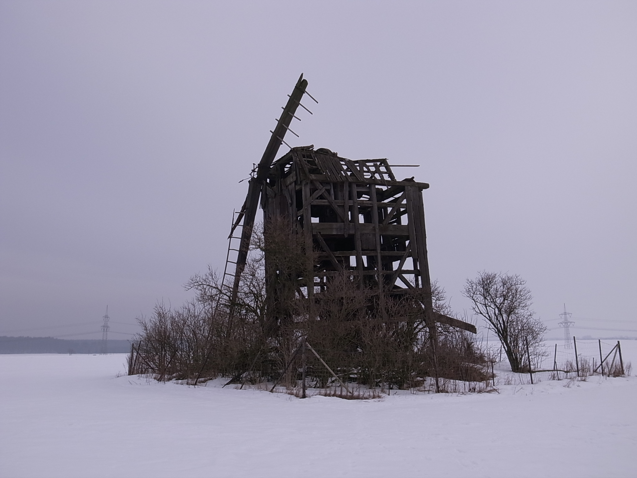 Köselitz_Windmühle, Koordinaten: 51.954944 12.496100